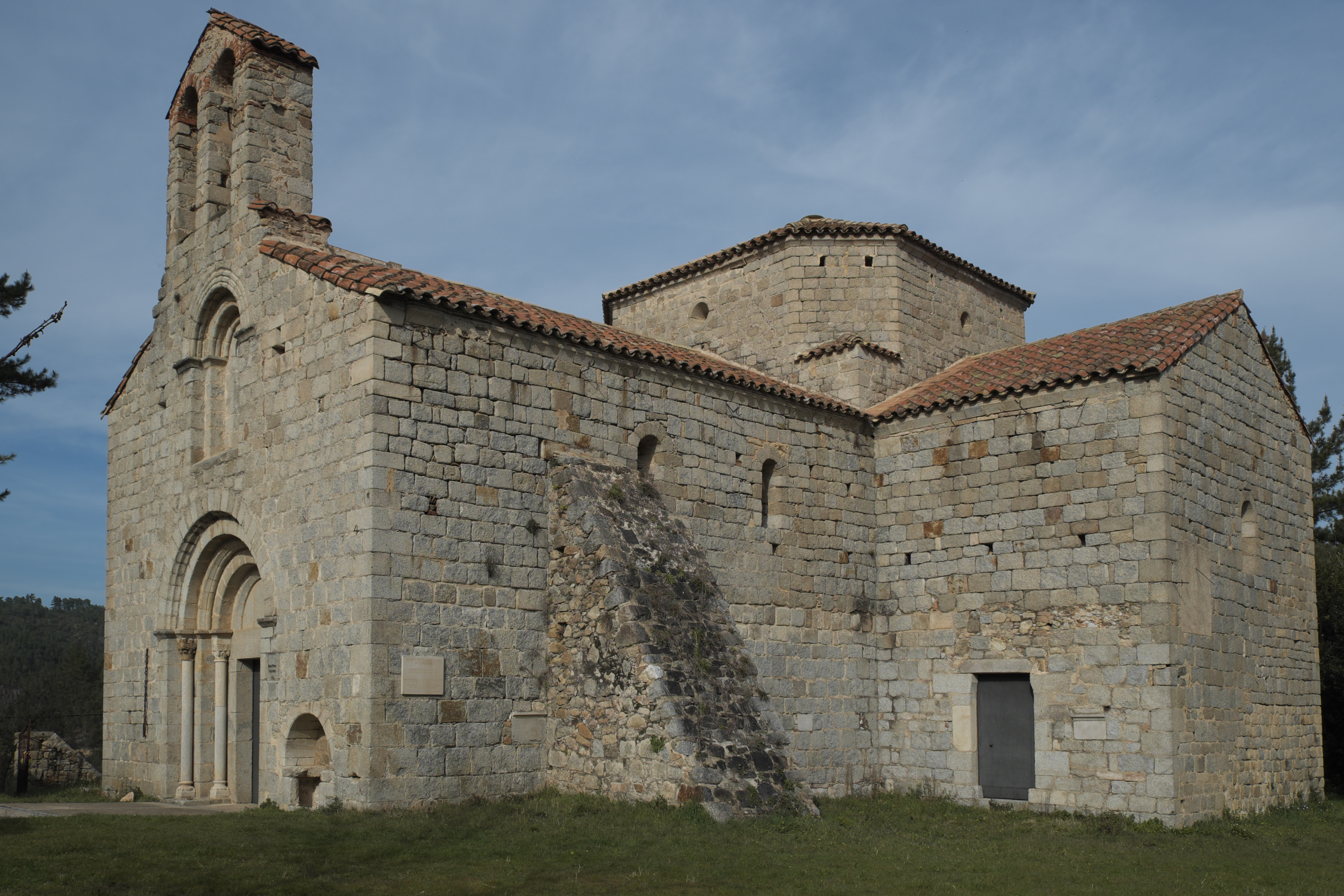 Ehemalige Klosterkirche Sant Pere Cercada in Santa Coloma de Farners in der Provinz Girona (Katalonien/Spanien)